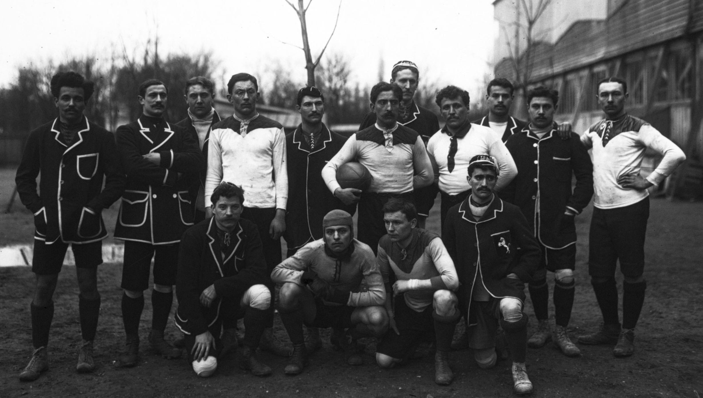 Football club de Lyon [équipe de rugby] : [photographie de presse] / [Agence Rol].